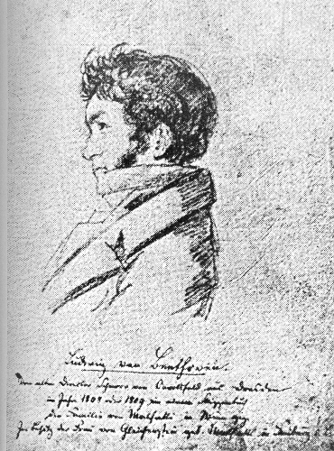 Apunte a lápiz de Beethoven por Schnorr von Carolsfeld de 1809